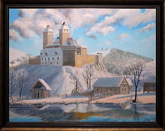 olej na plátně 94x72 cm